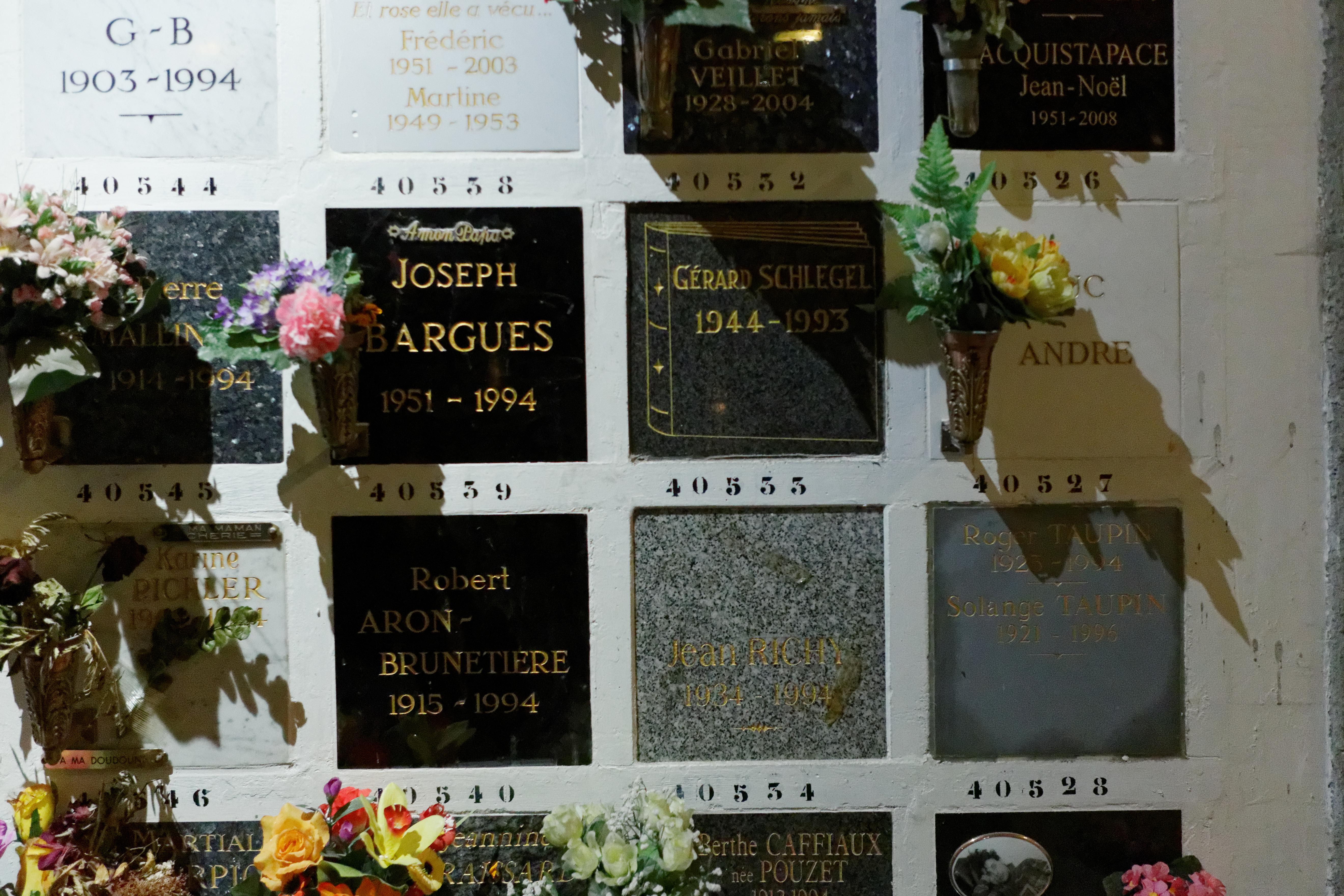 Cases du columbarium du cimetière du Père-Lachaise.